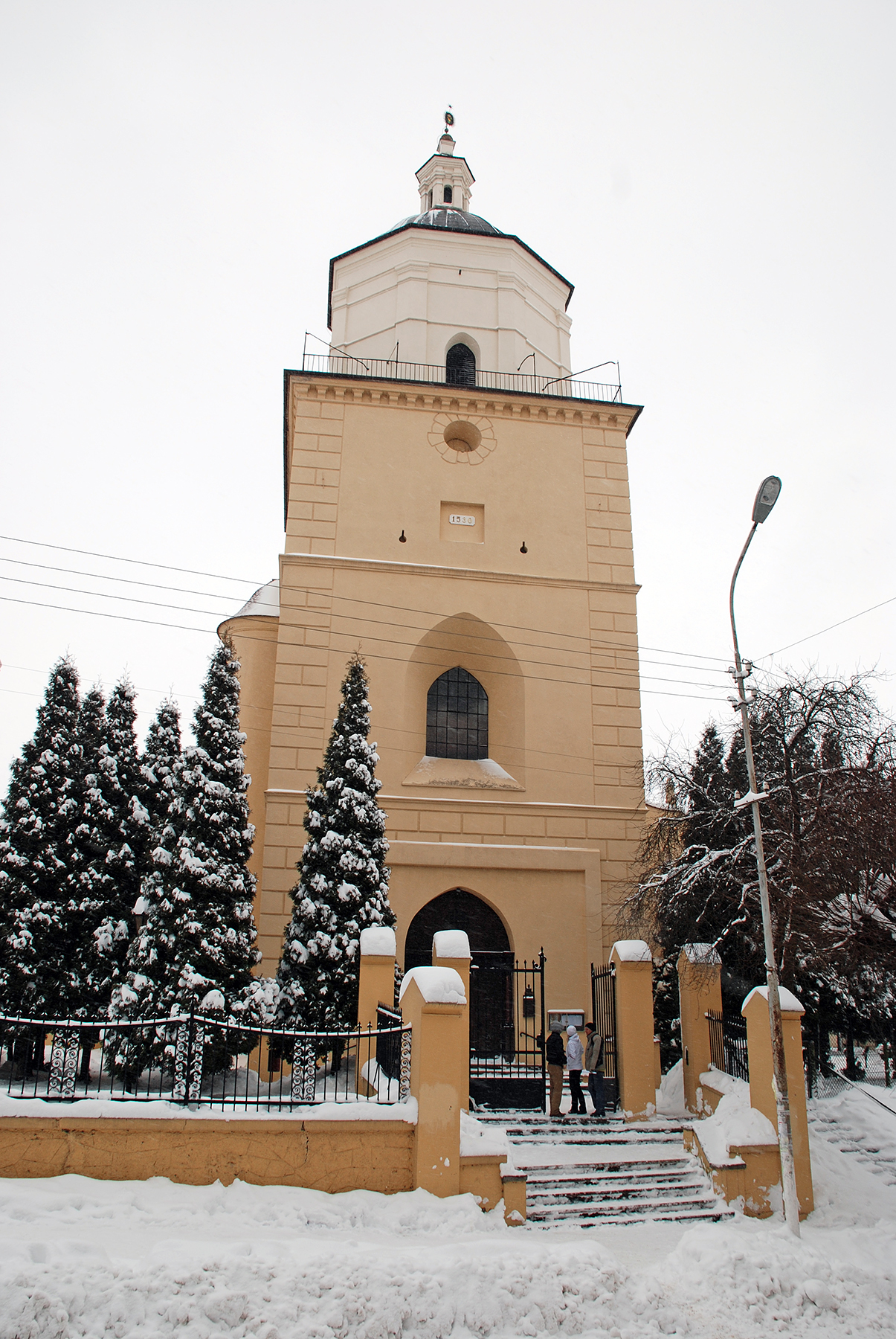 Костел Св. Іоанна Хрестителя (мур.), Самбір, ул.Пушкіна, 7